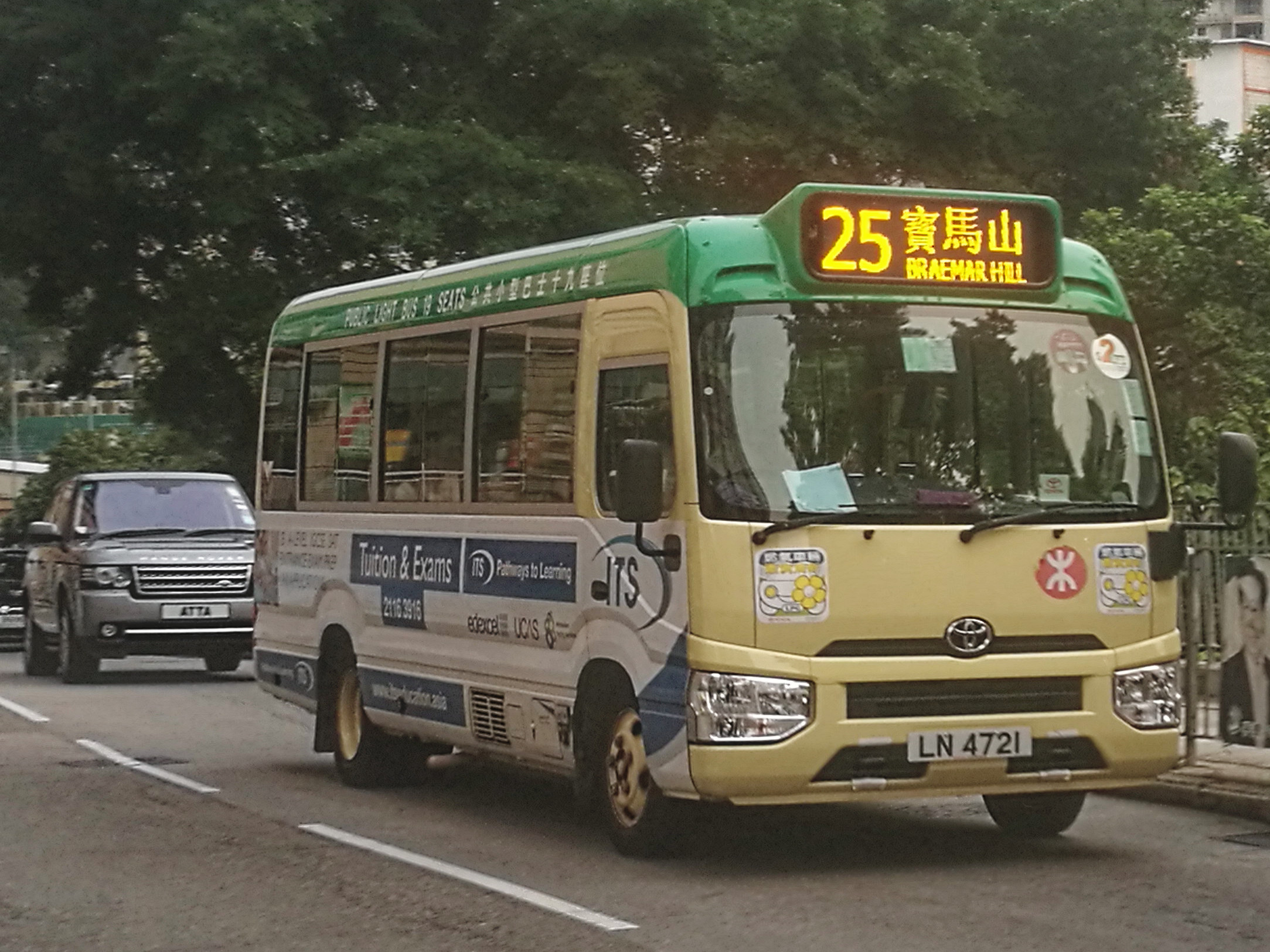 小巴LN4721的照片